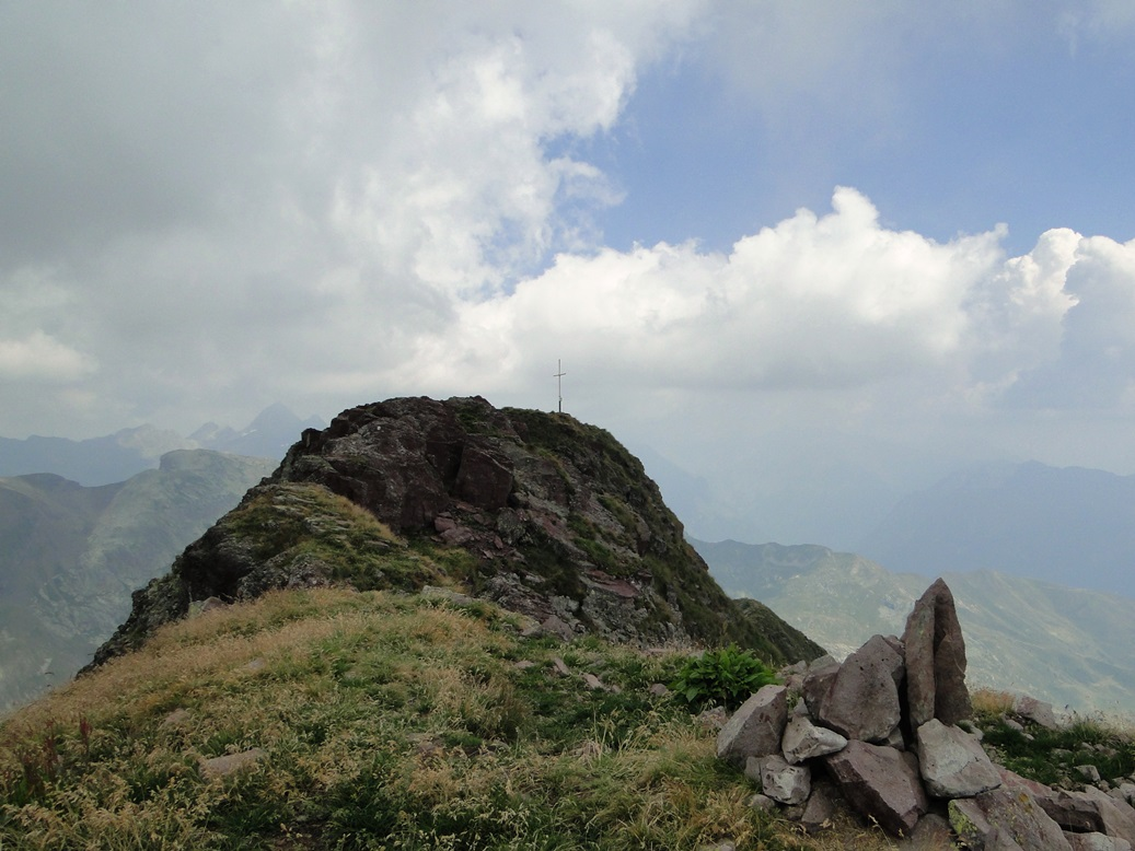 Monte Pradella, prealpi bergamasche (BG).